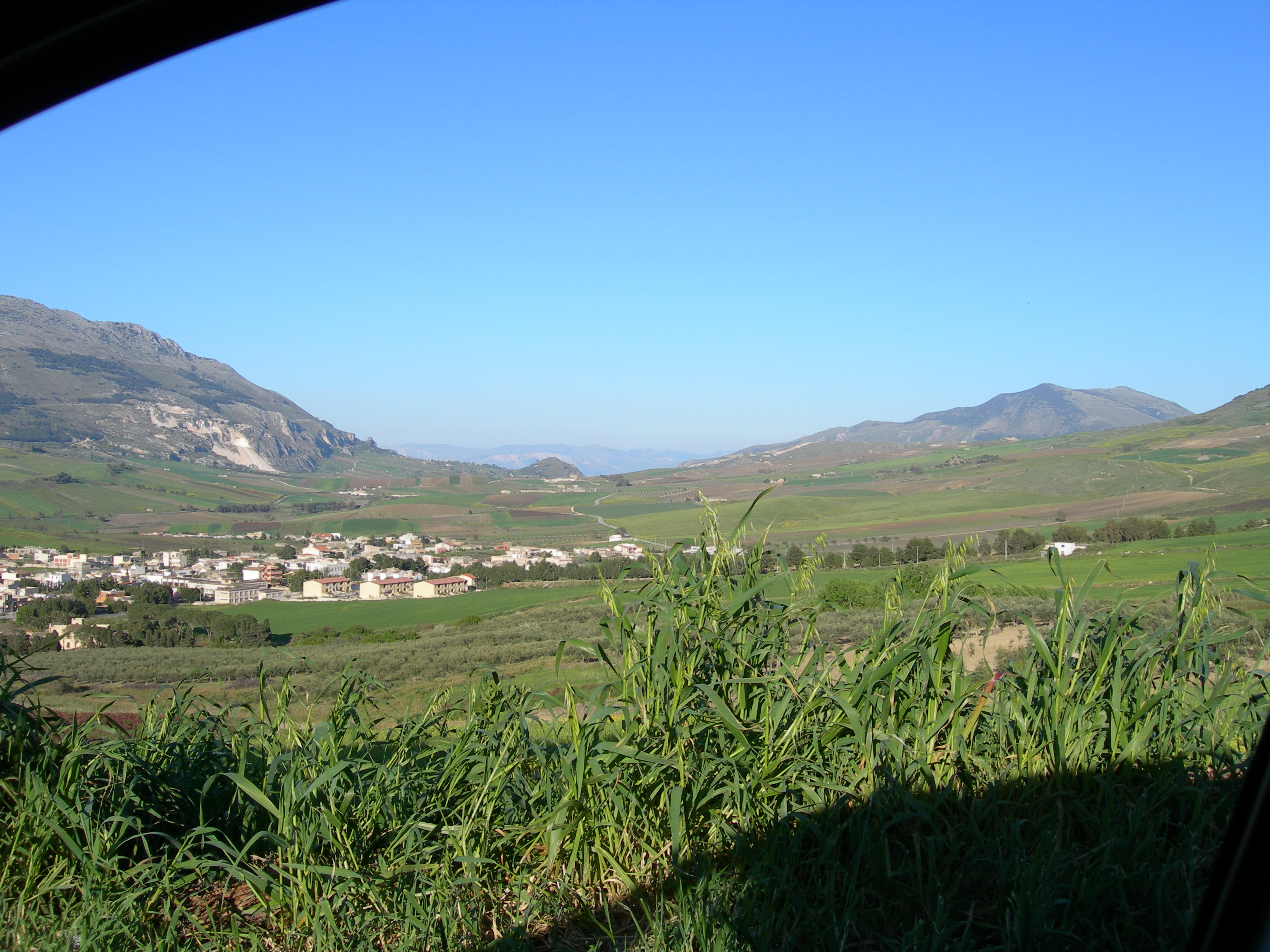 Panorama view of Buseto Palizzolo